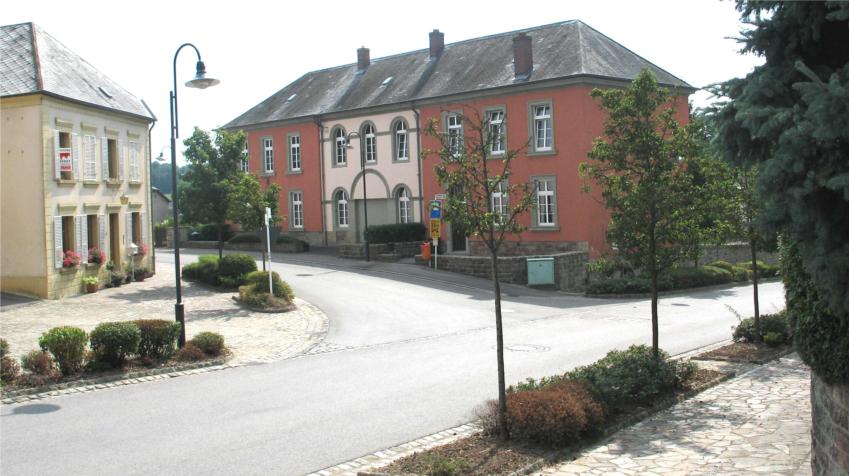 Zu Steeën Vis-a-vis vun der Kierch